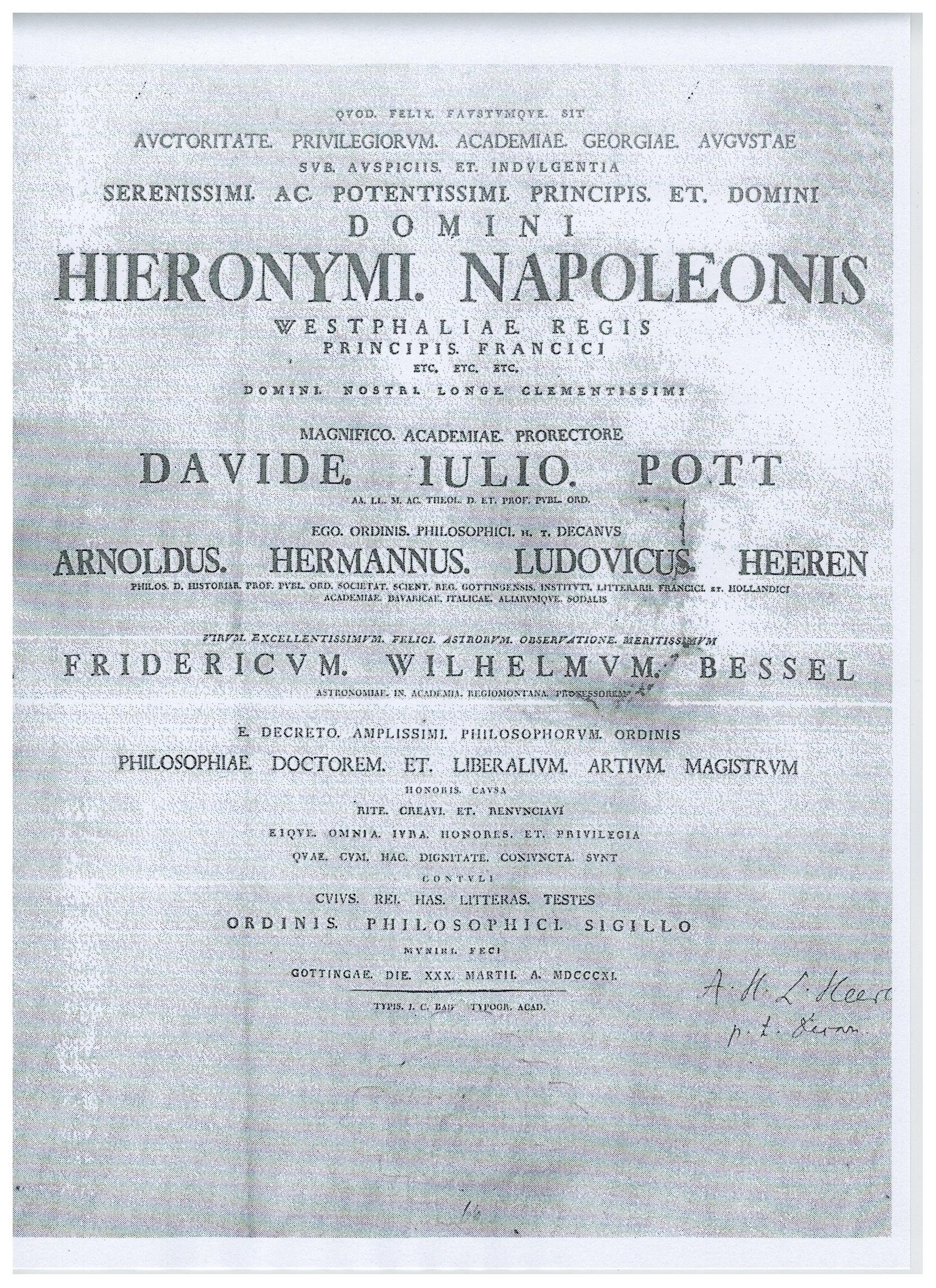 Friedrich Wilhelm Bessel (1784-1846) Ehrendoktordiplom von 1811